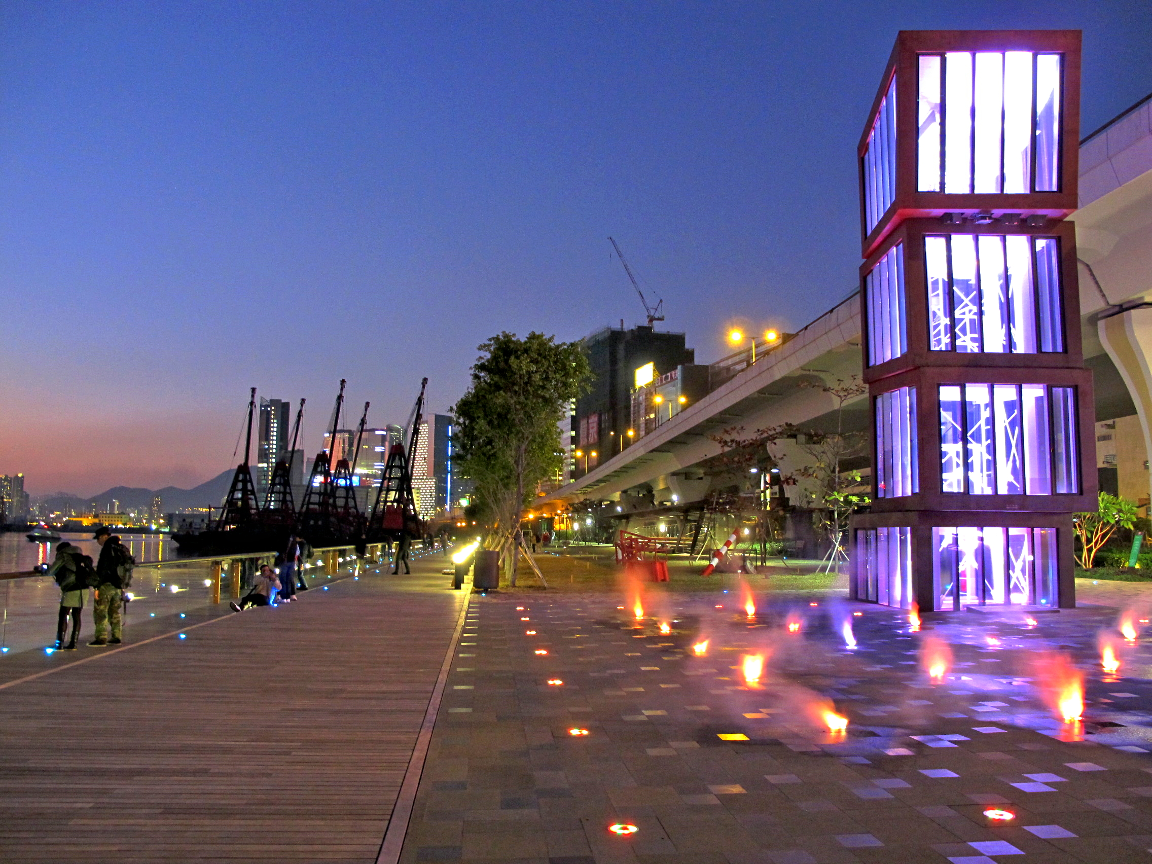 Kwun Tong Promenade